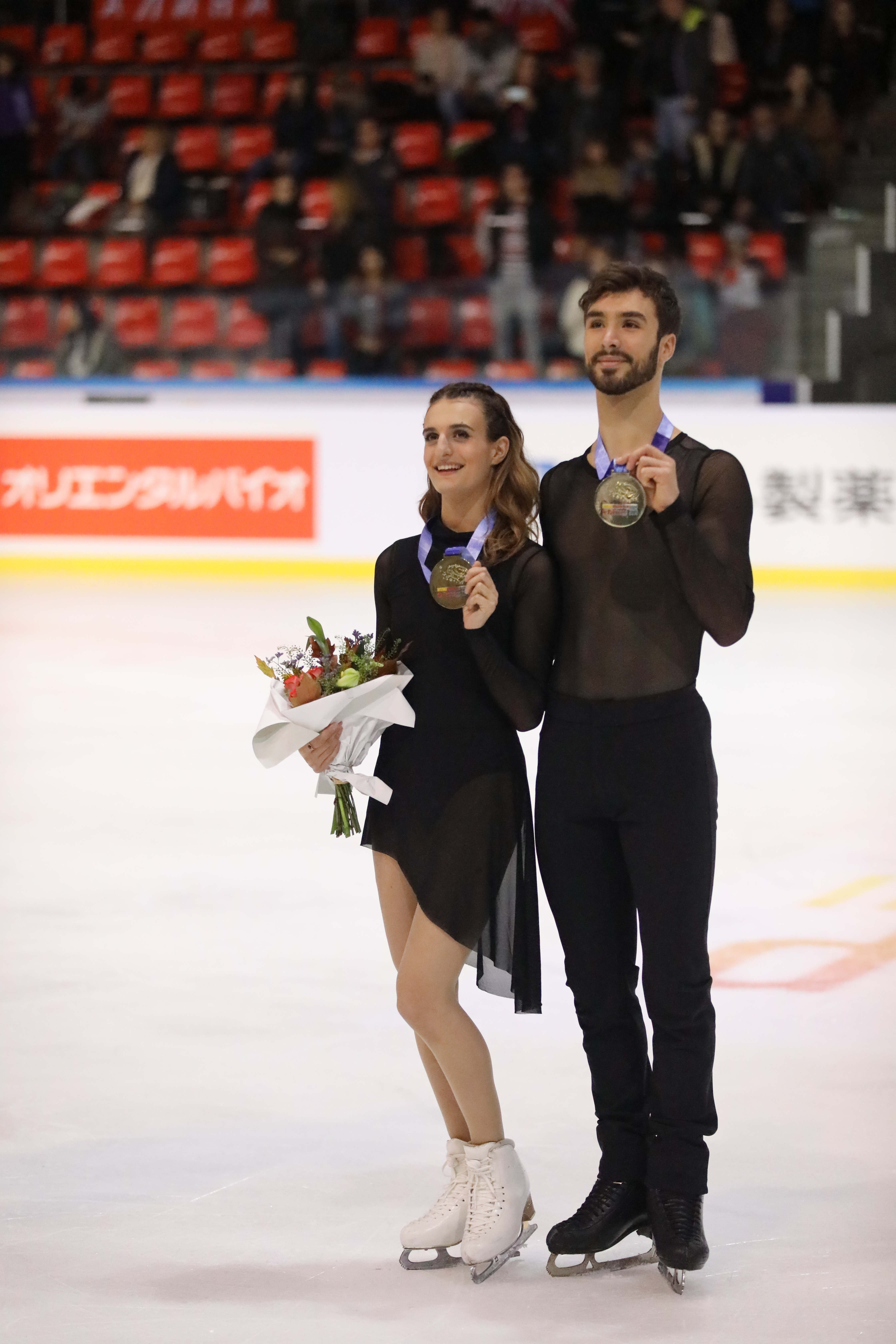 Médaillés d'or en danse sur glace aux Internationaux de France 2019.